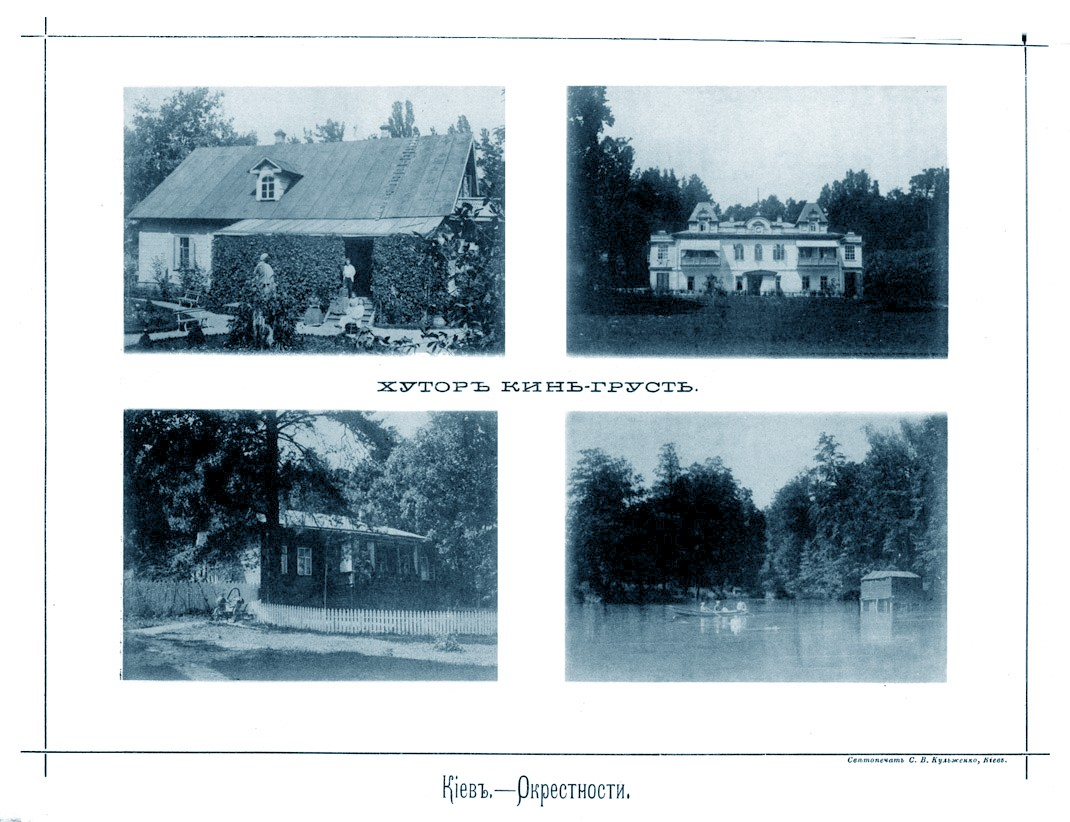 Київ XIX ст. Передмістя. Хутір Кинь-Грусть. Kyiv. Khutir Kyn'-Grust' Kyiv. Khoutir Kygn-Groust'